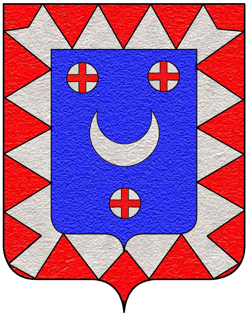 Stemma della famiglia Gabrielli